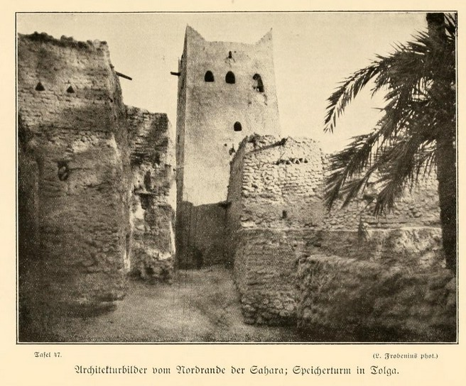 ((Commune de Tolga) / Wilaya de Biskra) “ Speicherturm in Tolga, am Nordrand der Sahara” - from Expeditionsbericht der Zweiten Deutschen Inner-Afrika-Expedition (1907-09) Auf dem wege nach Atlantis.